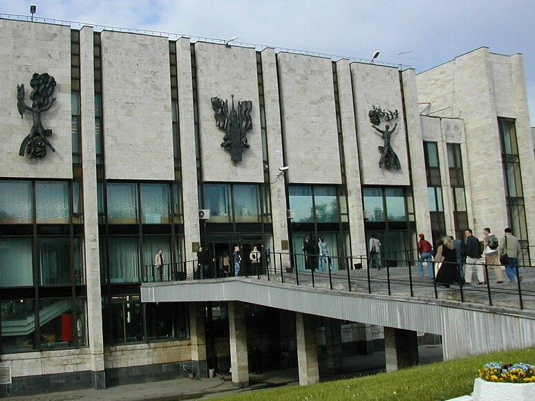 Moskiewski Państwowy Instytut Stosunków Międzynarodowych (MGIMO), wejście główne. Moskwa, 4 czerwca 2003 r.